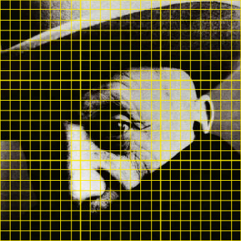 Imatge mostrejada